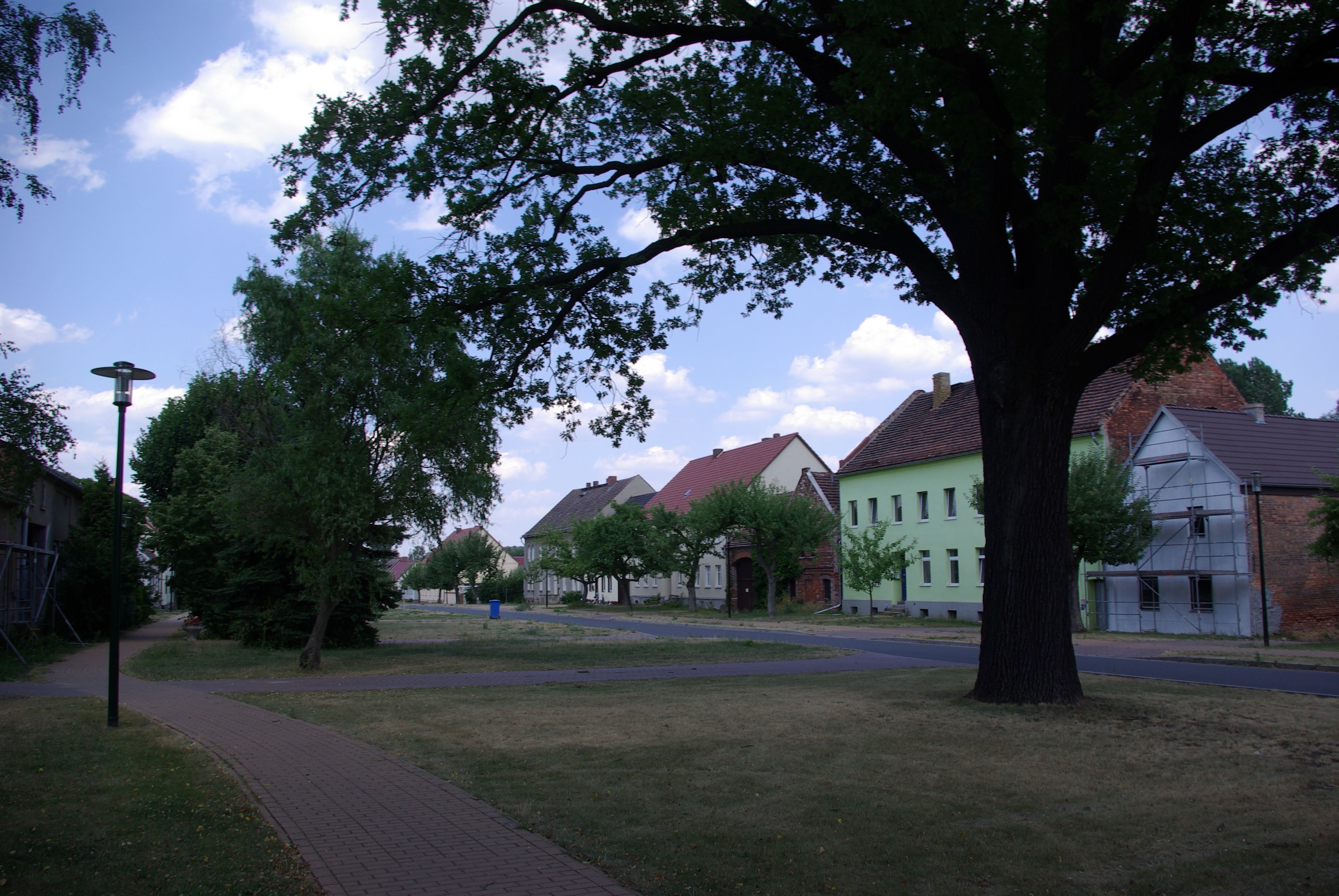 Jüterbog Ortsteil Neuheim in Brandenburg. Die Straße in Neuheim, links liegt die Kirche.